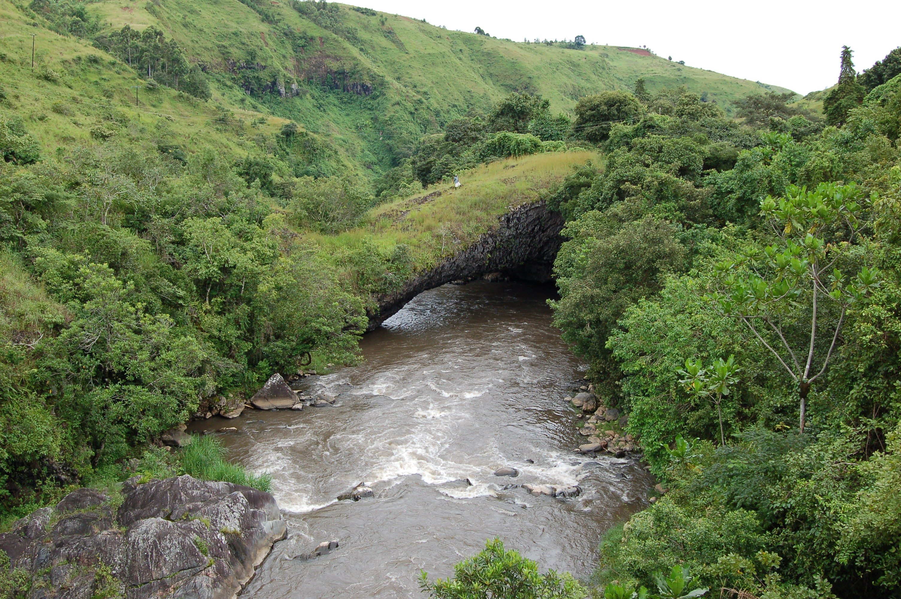 Bridge of God, Kiwira valley Tanzania